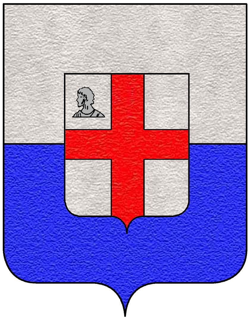 Stemma della famiglia Cocastelli